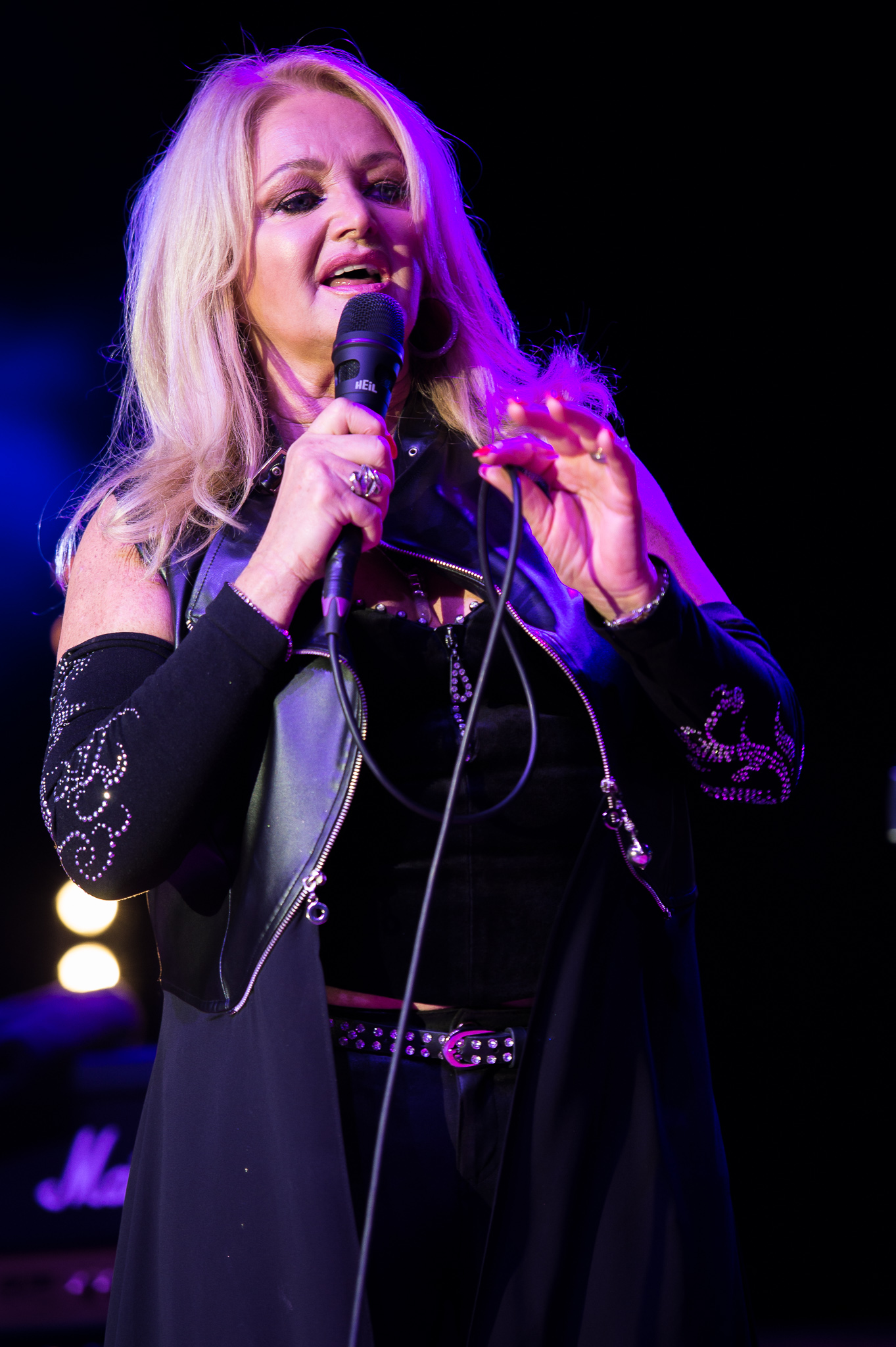 Bonnie Tyler,Concertbüro Franken,Greatest Hits Tour,Konzert,Livekonzert,Livemusik,Meistersingerhalle,Musik